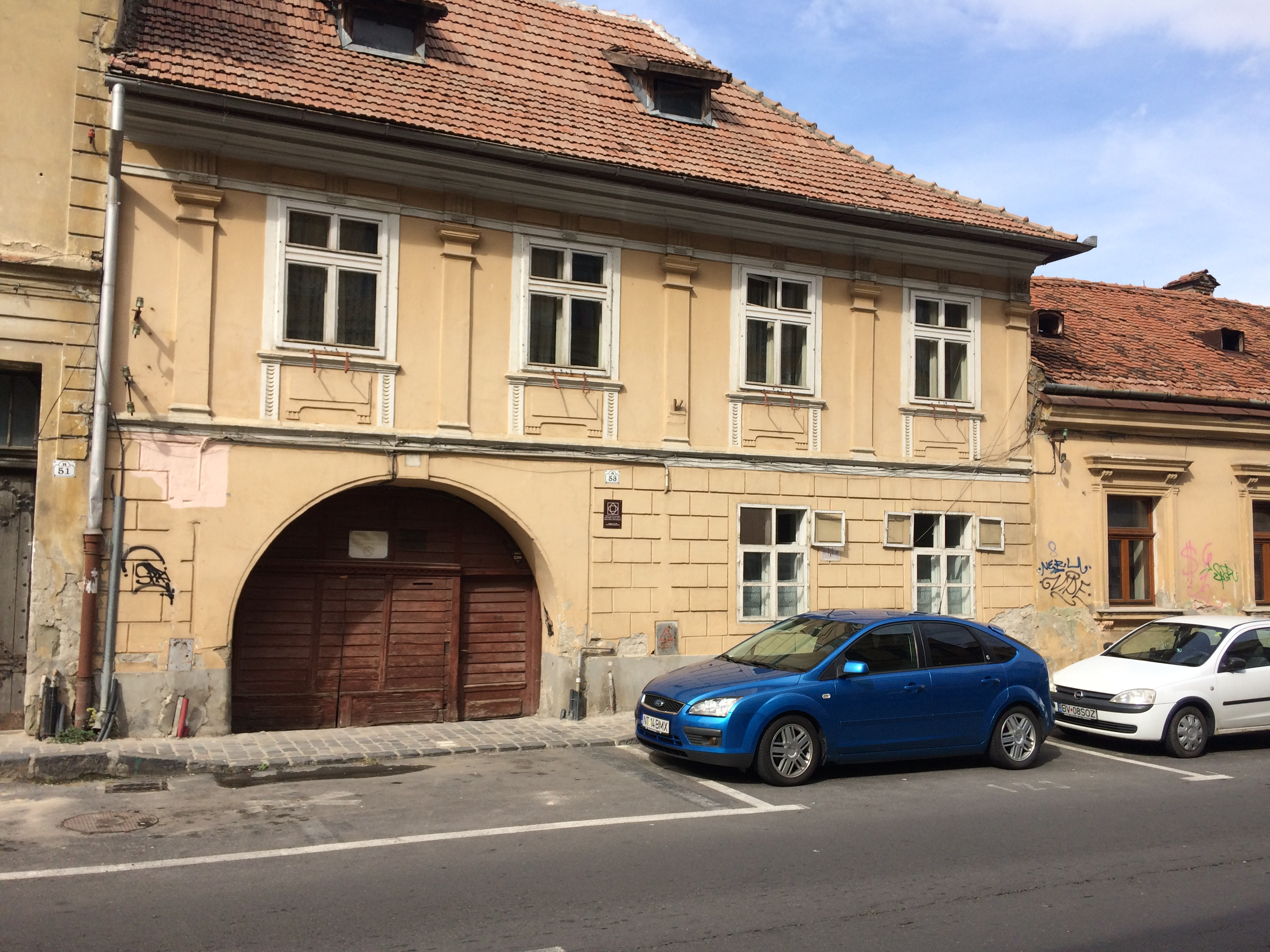 Brasovean house in Brasov, Romania, from my town.